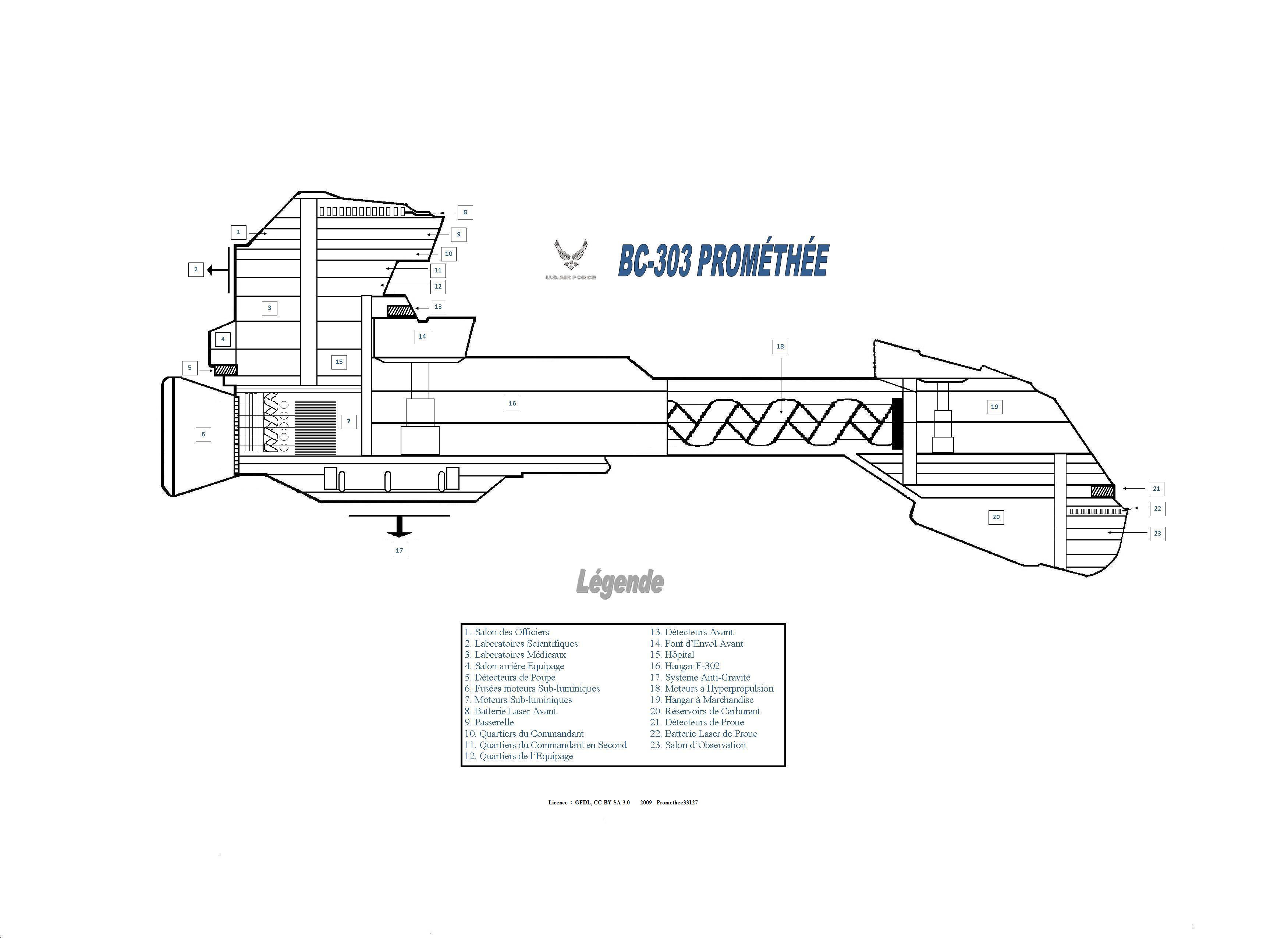 Česky: Nákres pozemské vesmírné lodě Prométheus (BC-303) z Hvězdné brány